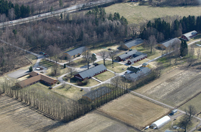 Berg Kretsfengsel